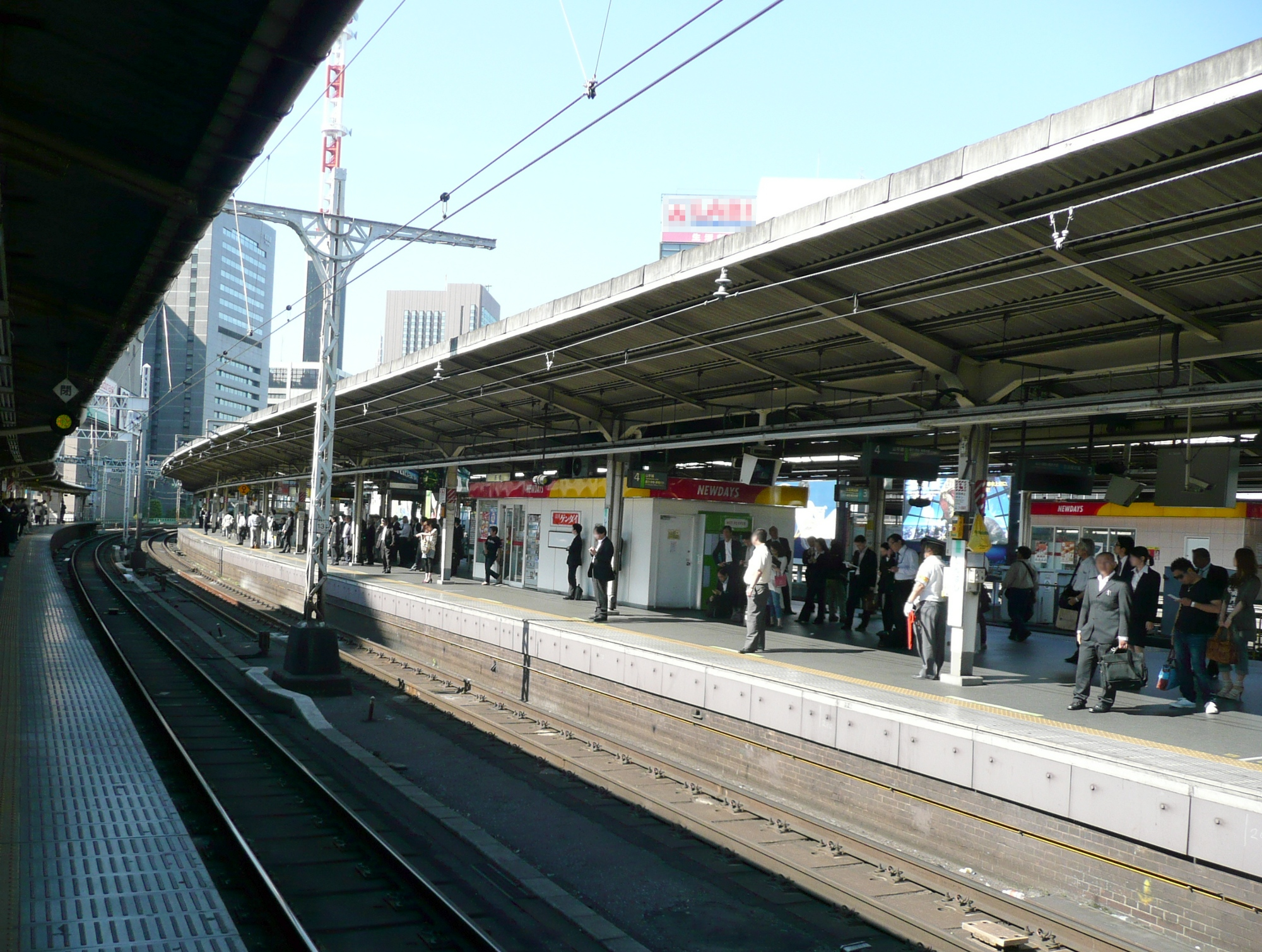 新橋駅山手線内回りホームから外回りホームを望む